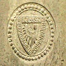 Wappen der Hodenberger an Stein